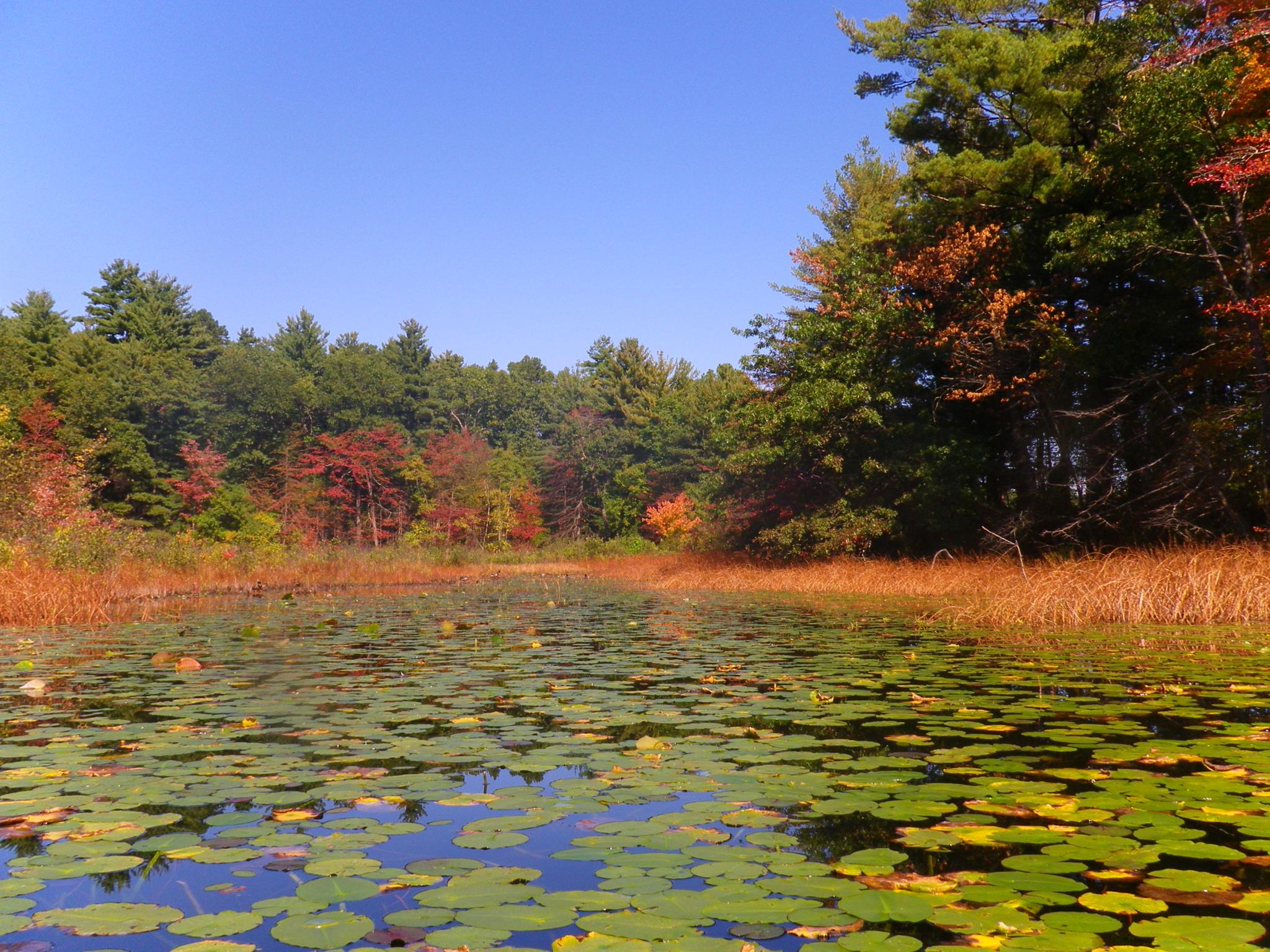 Hampton Ponds - Westfield MA